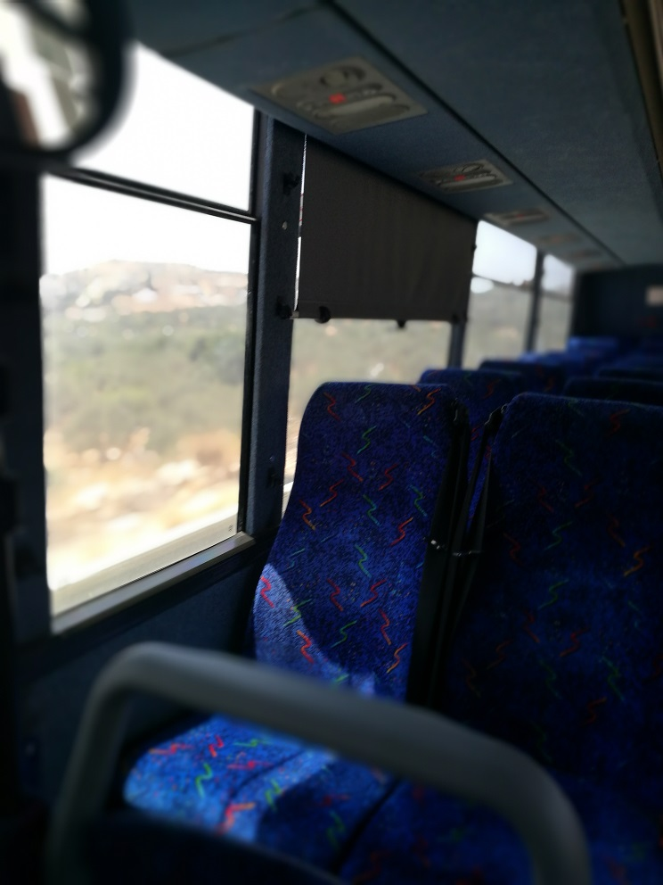 אוטובוס בין עירוני מבפנים